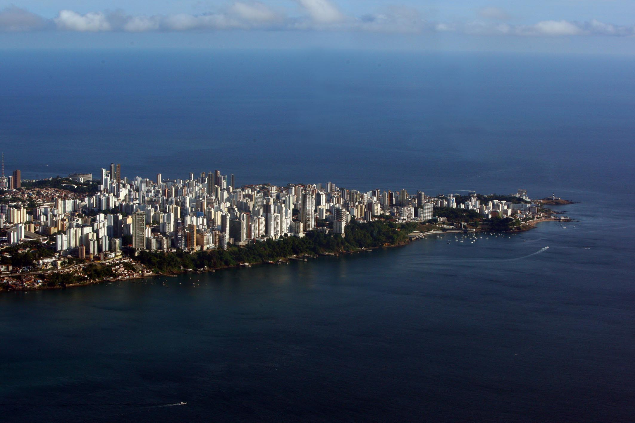 Vista de Salvador ponta da Barra Foto Manu Dias/AGECOM